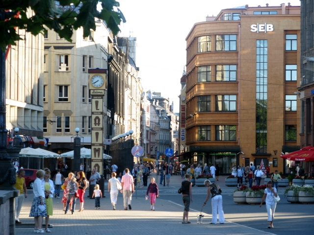 Rigan kaupungin keskusta